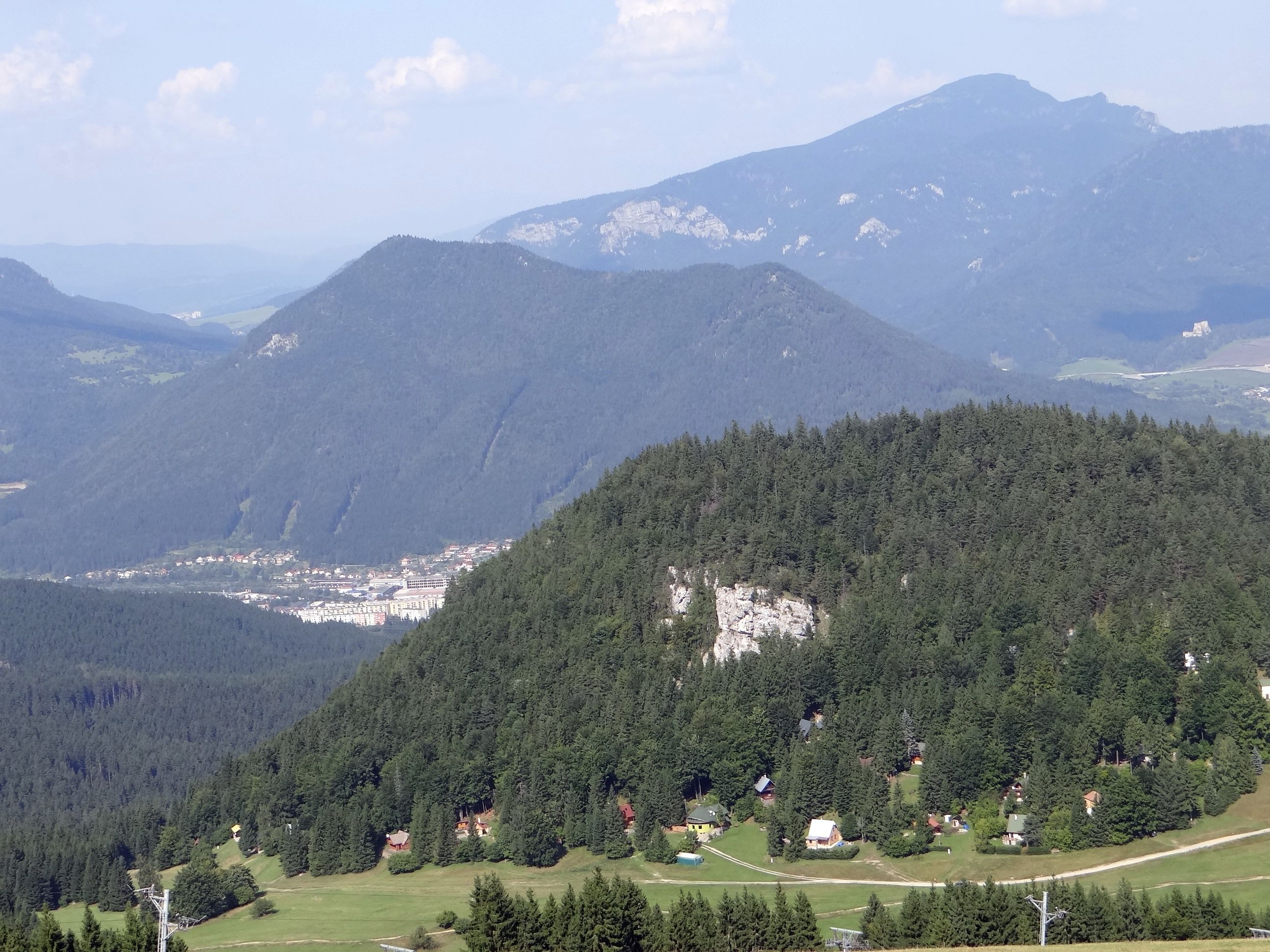 Čebrať